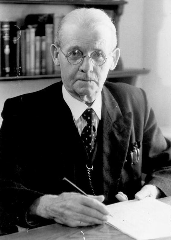 Zentralbild /Blumenthal 9.3.1957 Prof. Dr. Dr. h.c. Hermann Haack, Nationalpreisträger, Nestor der deutschen Kartographie, geb. 29.10.1872 in Friedrichswerth bei Gotha gest. 22.2.1966 in Gotha